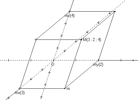 Repère cartésien "oblique" dans l'espace Image personnelle Licence GFDL HB